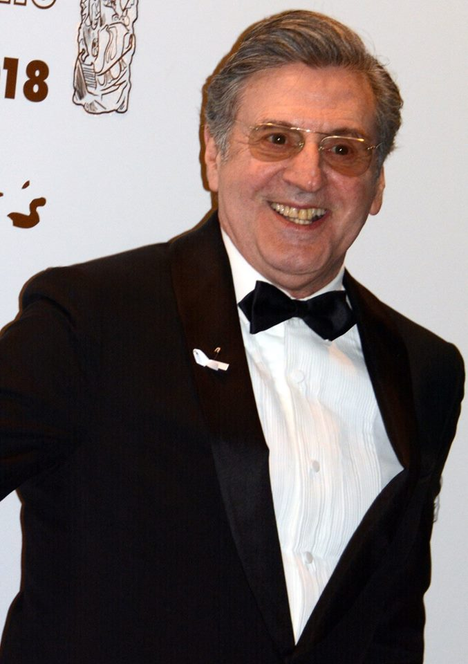 Daniel Auteuil à la cérémonie des César du cinéma